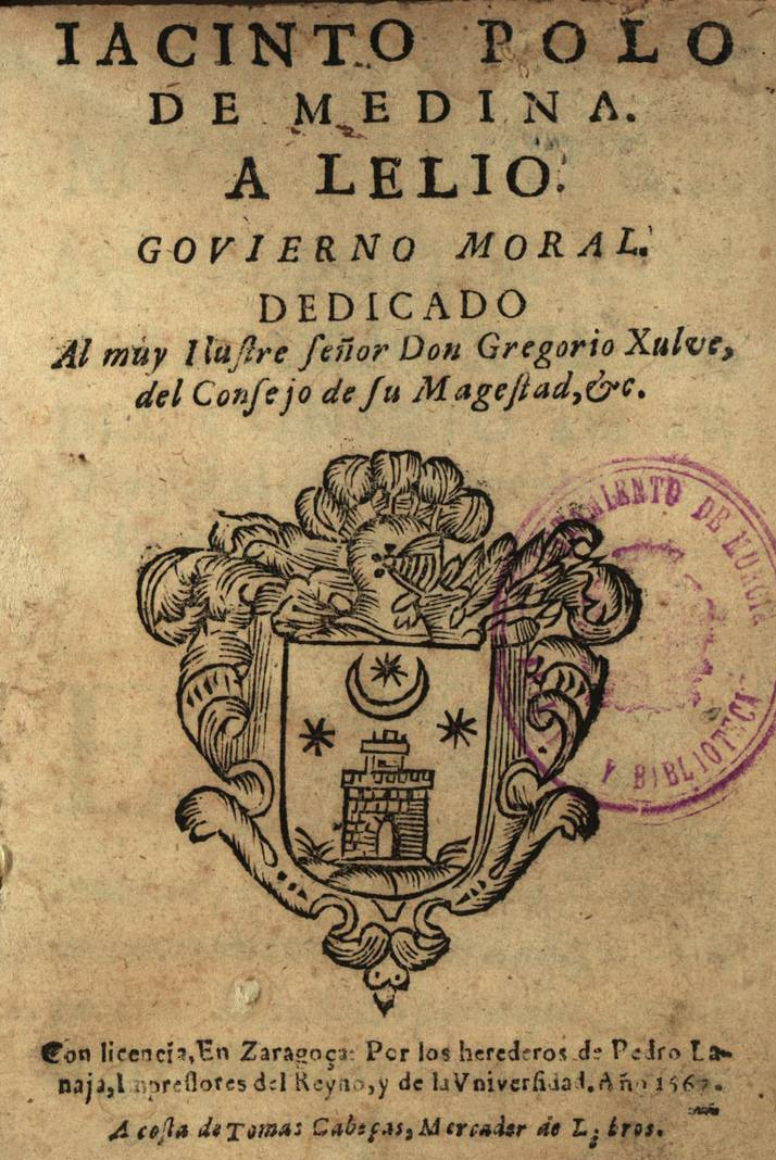 Jacinto Polo de Medina, A Lelio: gobierno moral..., Zaragoza, Herederos de Pedro Lanaja; a costa de Tomas Cabezas, 1667.